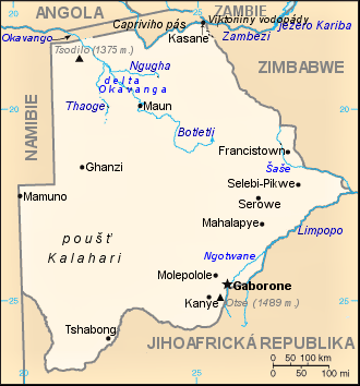 Orientační mapa Botswany.